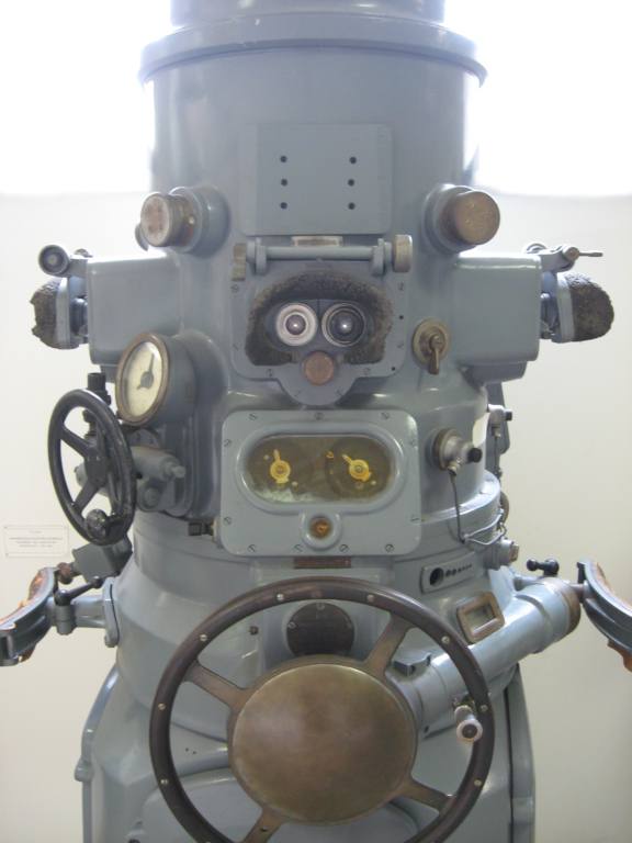 Dettaglio della sezione "brandeggio" dell'Apparecchio di Punteria Generale (A.P.G.) dell'incrociatore Raimondo Montecuccoli conservato presso il Museo Tecnico Navale di La Spezia